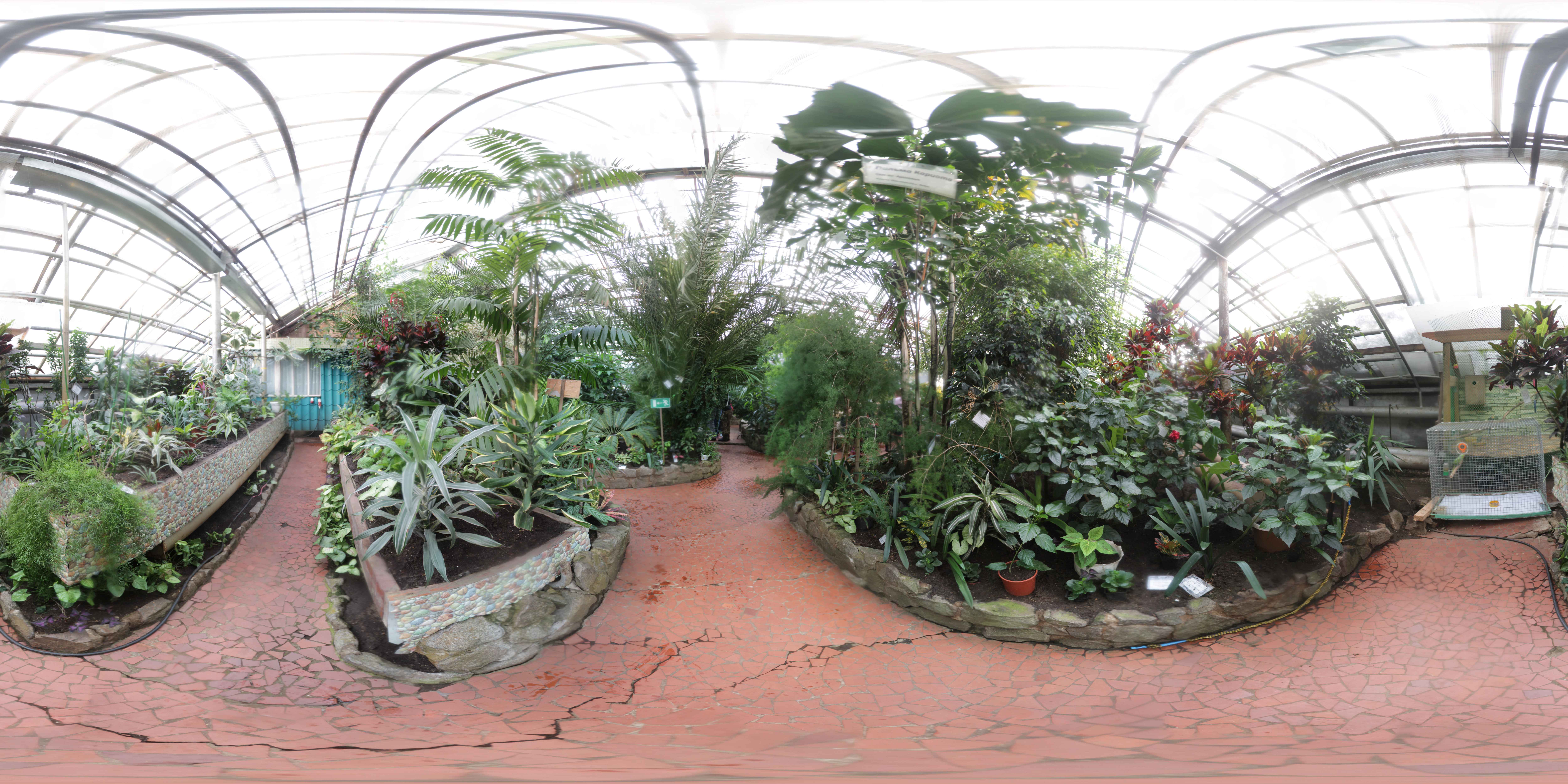 Ботанический зал